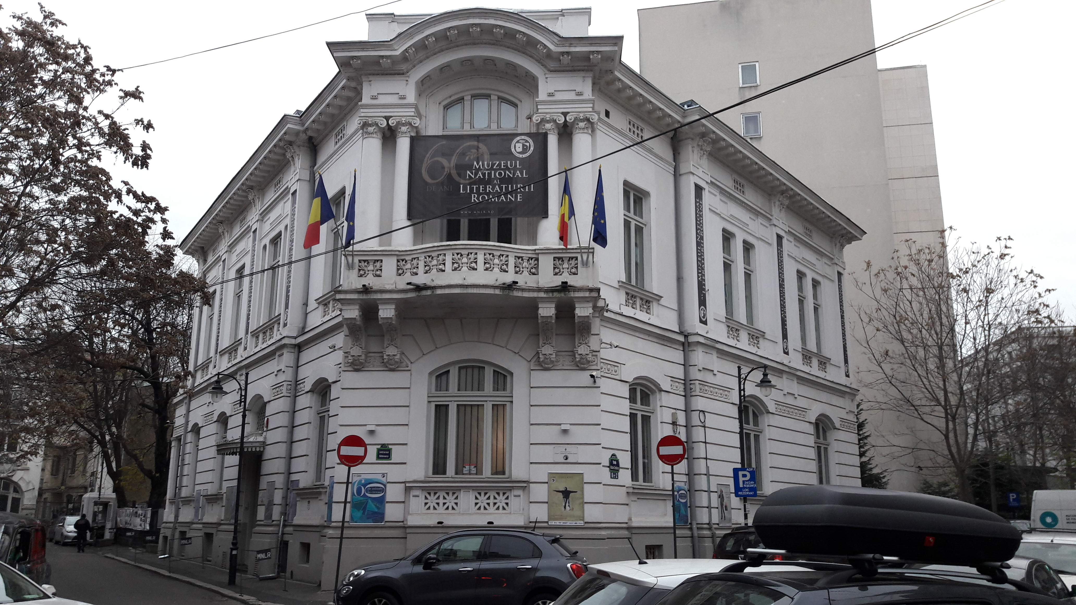 Muzeul Literaturii Române (2)